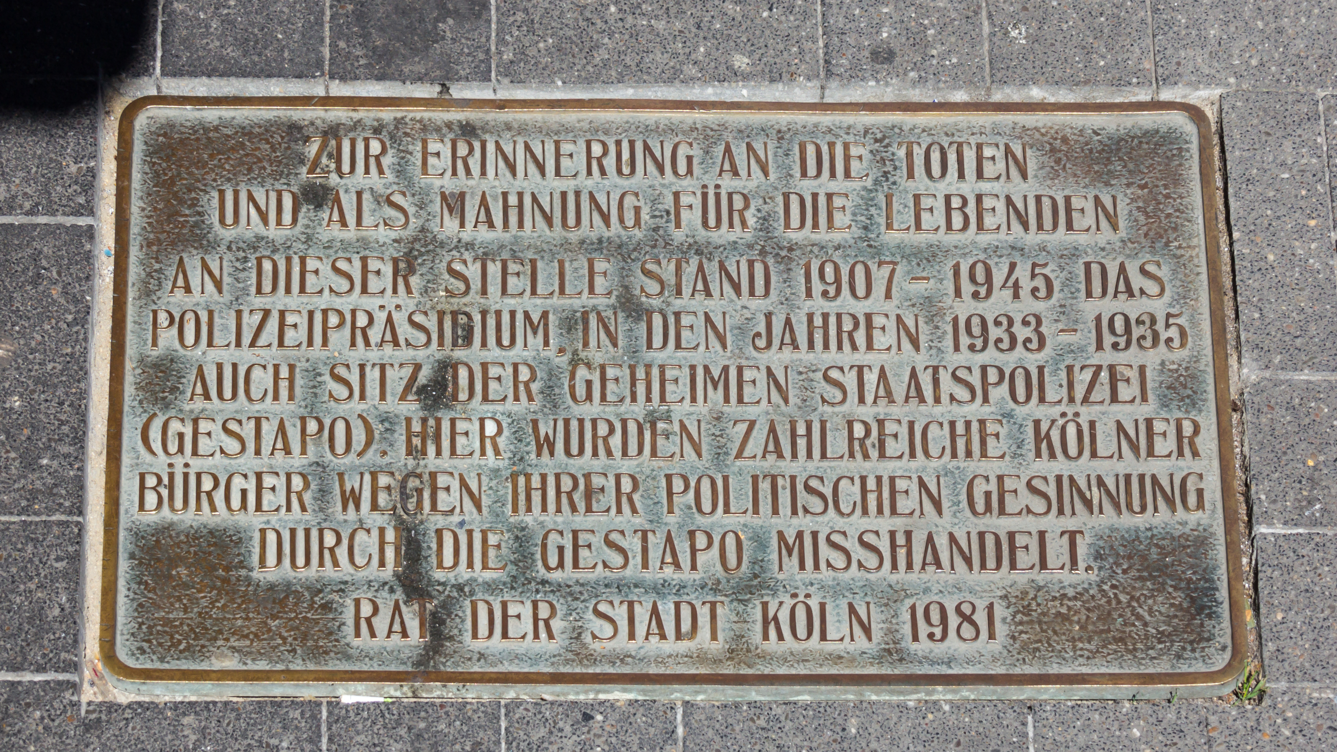 Gedenktafel für die Opfer im ehemaligen Polizeipräsidium Schildergasse, Köln. Standort: Krebsgasse an der Einmündung zur Schildergasse Text: Zur Erinnerung an die Toten und als Mahnung für die Lebenden An dieser Stelle stand 1907-1945 das Polizeipräsidium. In den Jahren 1933-1935 auch Sitz der Geheimen Staatspolizei (Gestapo). Hier wurden zahlreiche Kölner Bürger wegen ihrer politischen Gesinnung durch die Gestapo misshandeltRat der Stadt Köln 1981